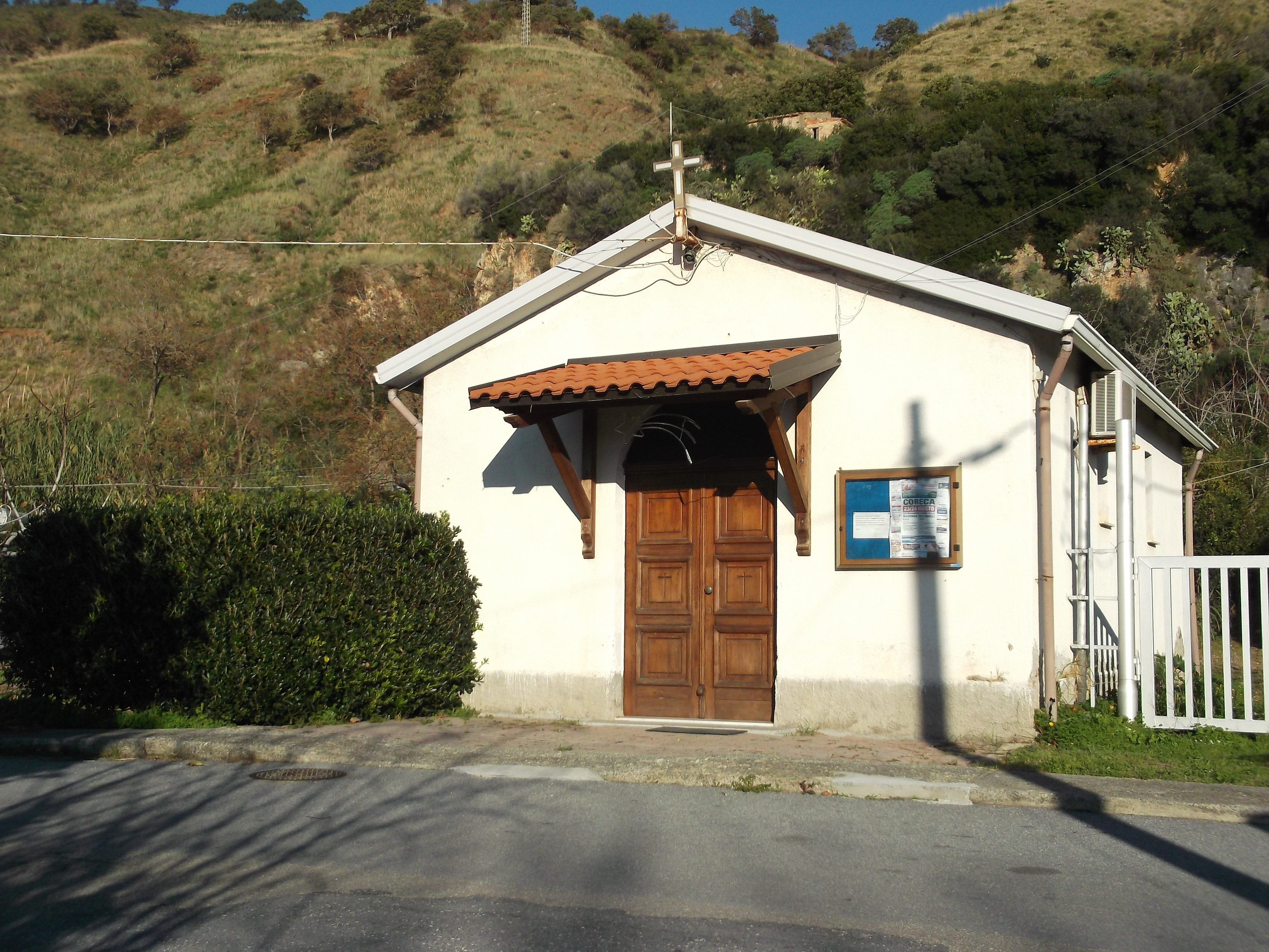 la Chiesa della Madonna degli Angeli a Coreca